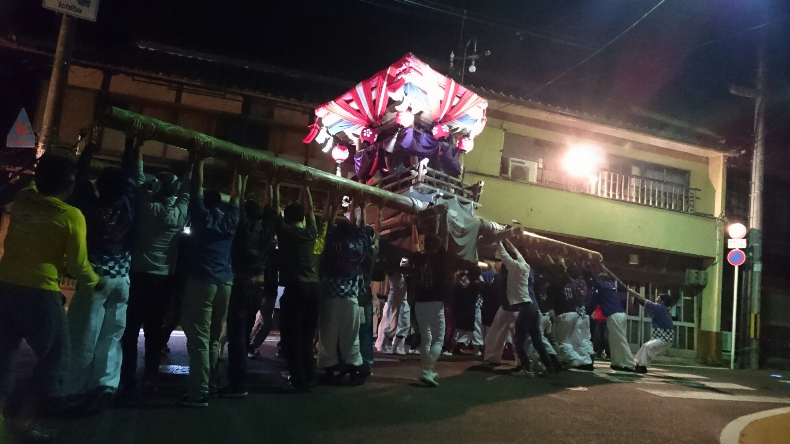 京都府笠置町南部区で行われる御神輿巡行